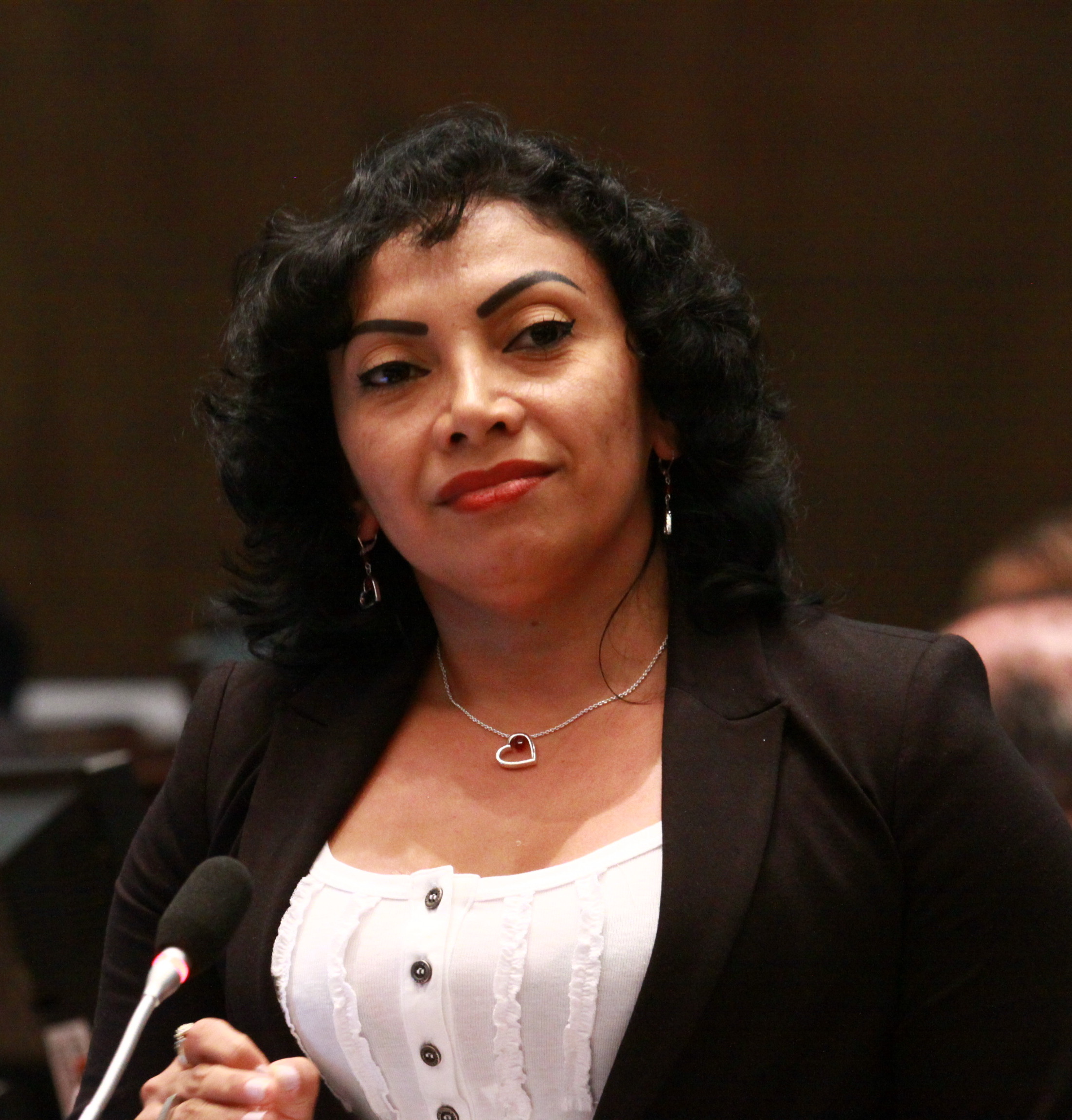 Foto: Hugo Ortiz Ron / Asamblea Nacional